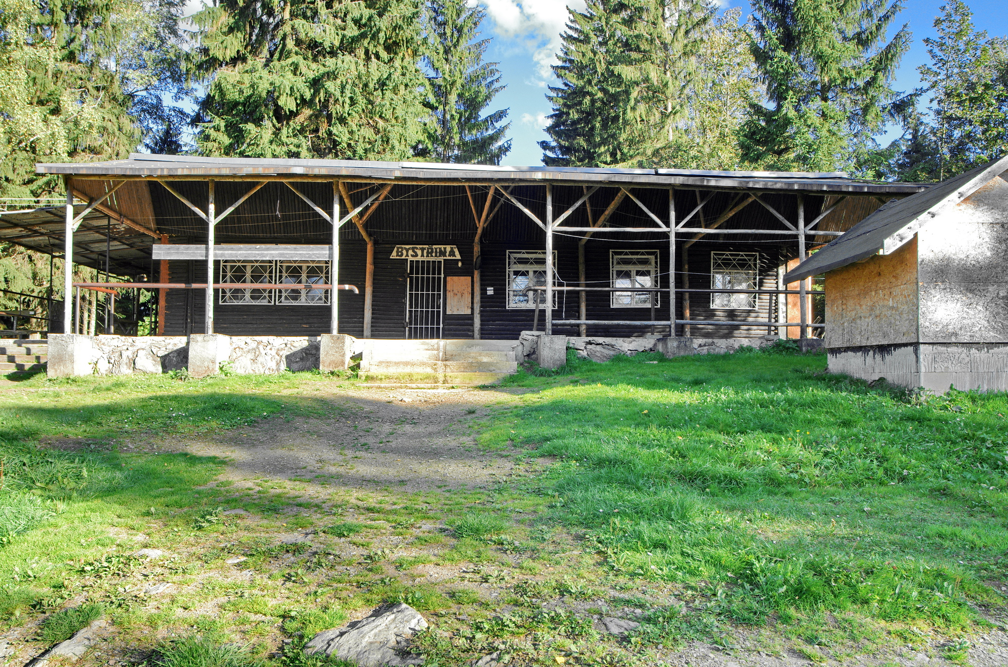 Bystřina, dětský tábor nad zaniklou osadou, Slavkovský les, okres Sokolov